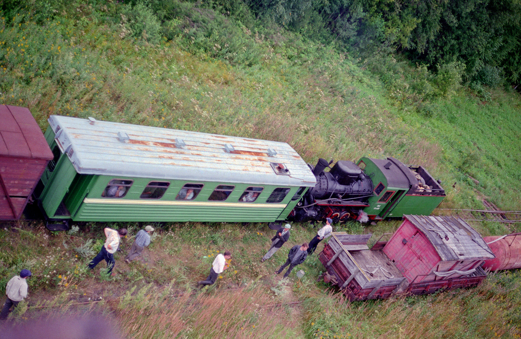 Любители узкоколейных железных дорог, английские и немецкие туристы едут в посёлок Купанское, чтобы осмотреть депо местной котельной. Паровоз Kп4-469, пассажирский вагон ПВ40 и четырёхосный крытый грузовой вагон Алтайского машиностроительного завода (1960 года постройки) остановились на станции Вёкса рядом с посёлком Купанское, Переславский район. Справа внизу виден пожарный поезд. Паровоз и вагоны принадлежат Переславскому железнодорожному музею-заповеднику.